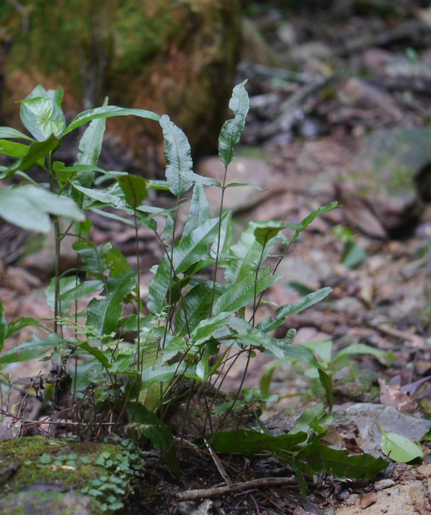 Thelypteris triphylla：コウモリシダ 2015/08/26 沖縄本島：Okinawa Island, Japan